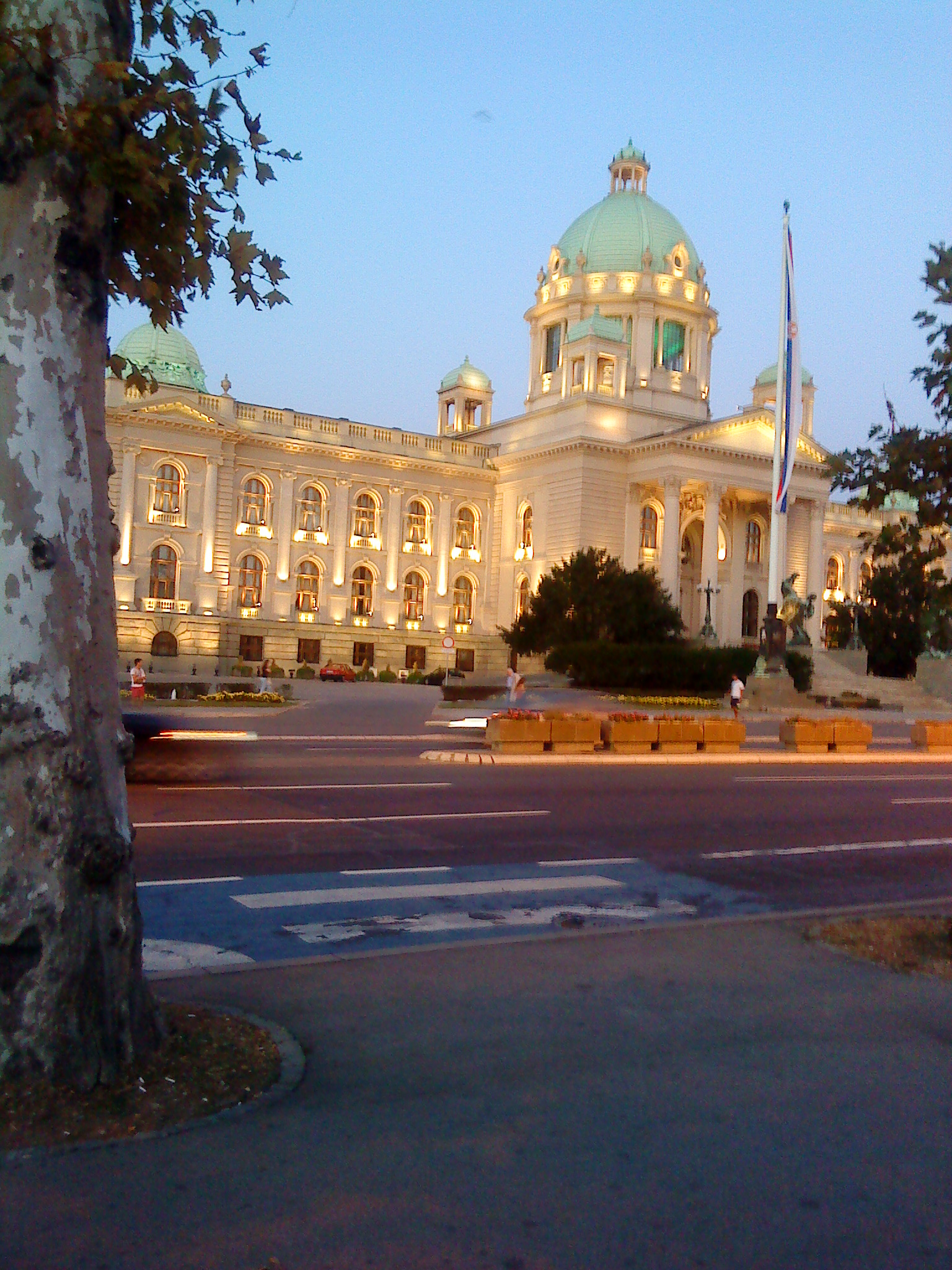 National assembly building